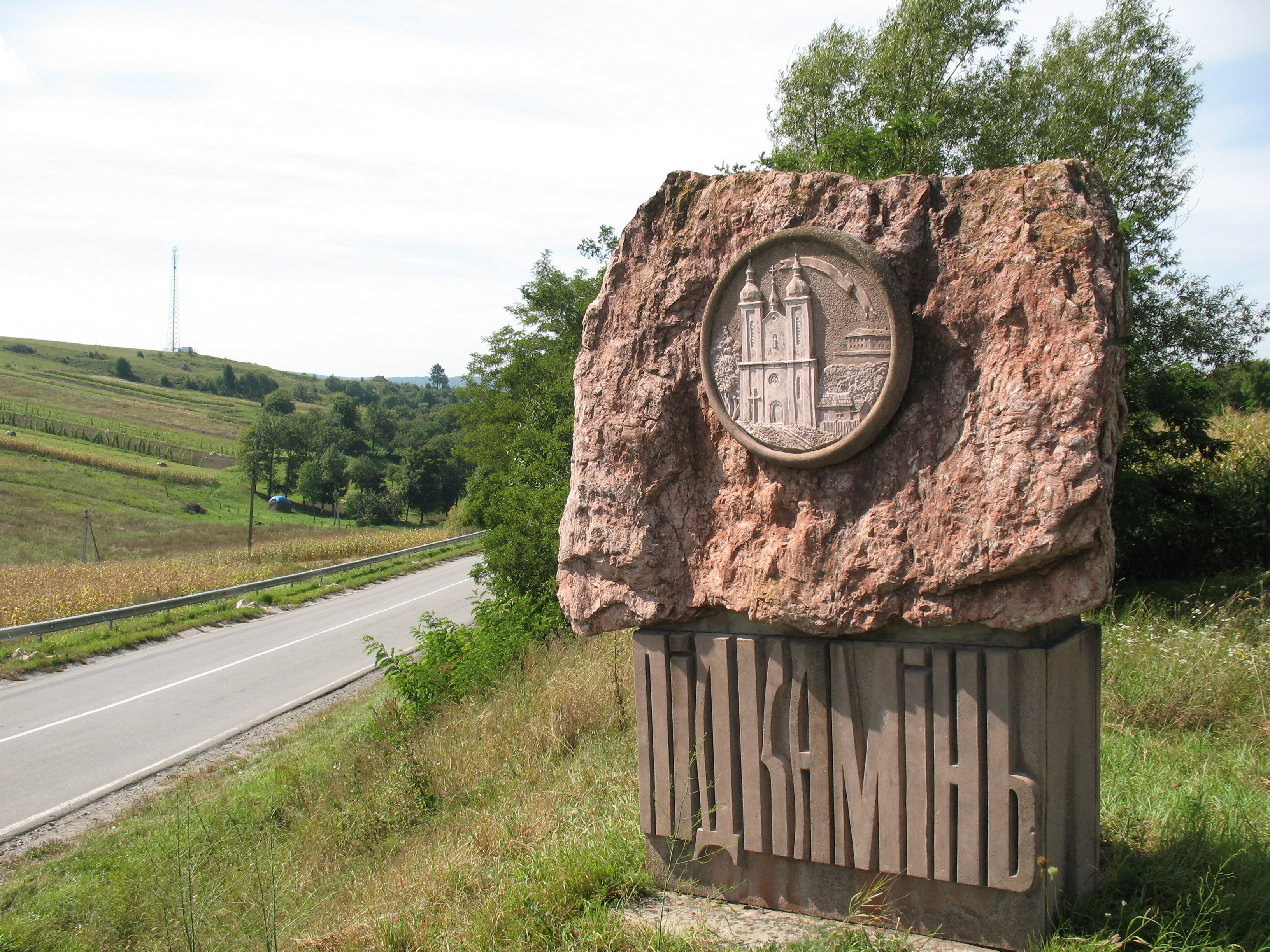 Фото знаку при вїзді з боку рогатина